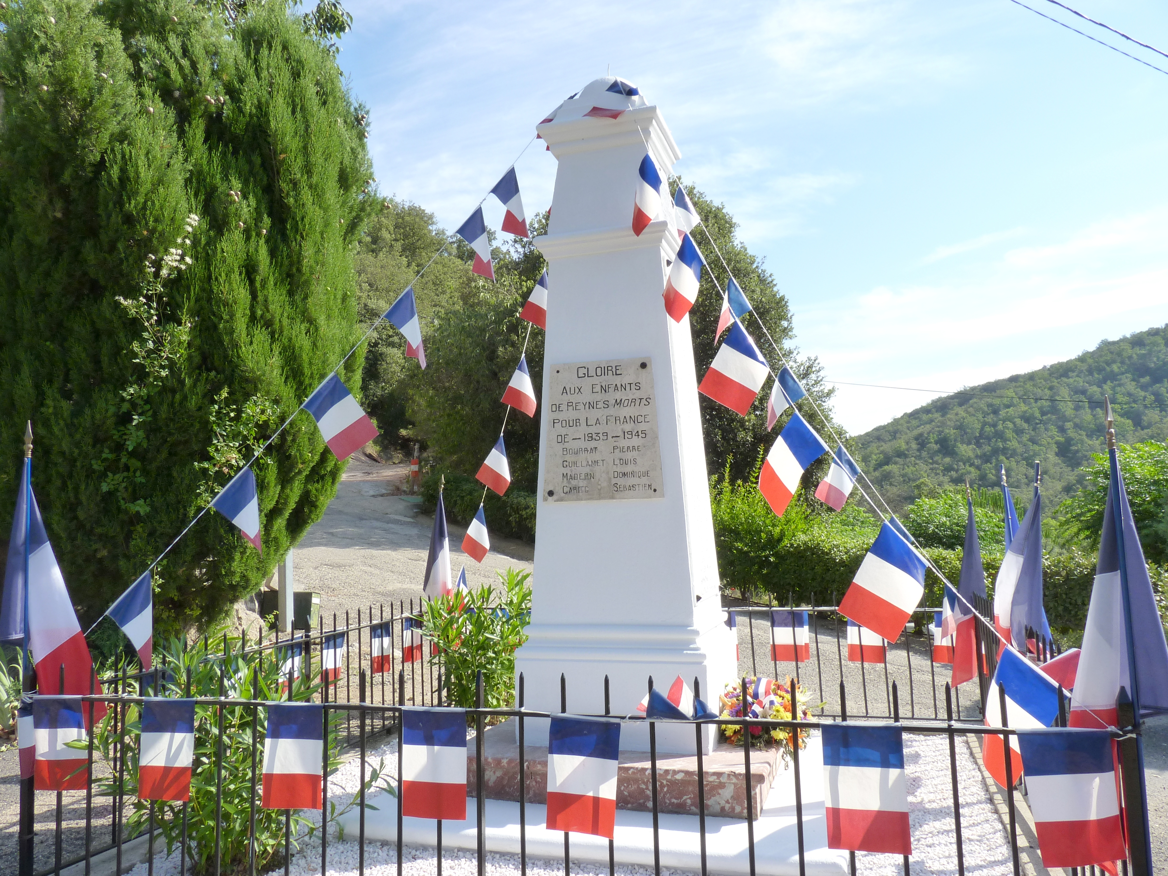 Monument aux morts, Reynès (Pyrénées-Orientales, Languedoc-Roussillon, France)